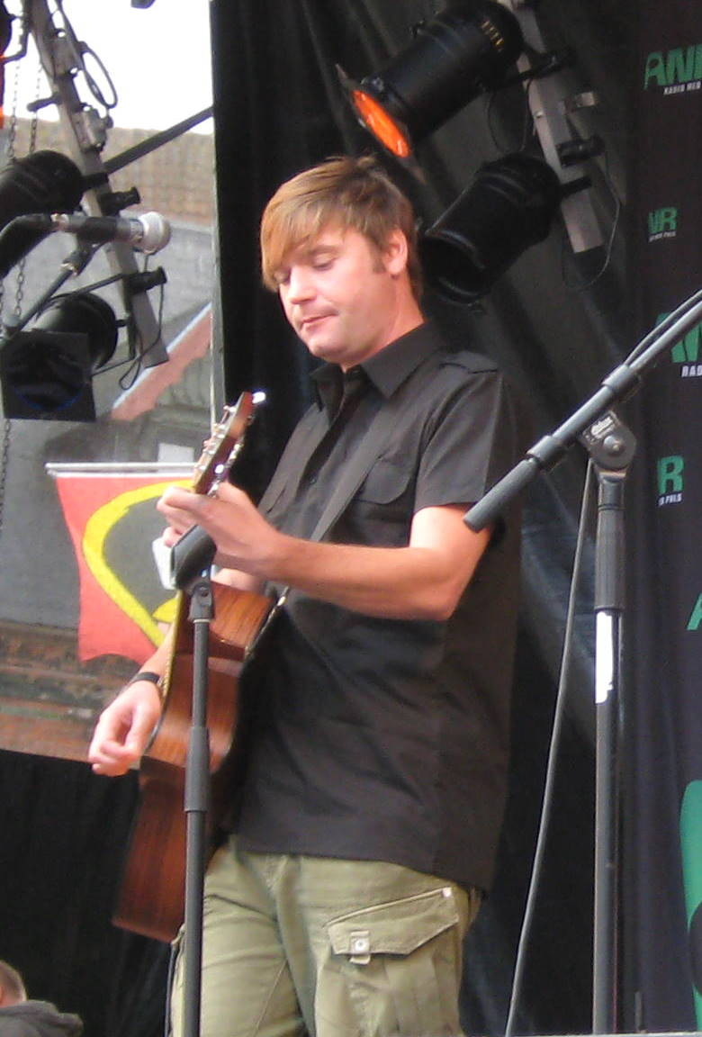 Christian Brøns